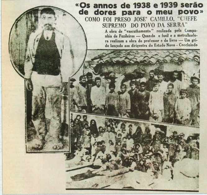 Legenda na imagem (atualizado ortograficamente): A obra de "vasculhamento" realizada pela Companhia de Fuzileiros. Quando o fuzil e a metralhadora realizam a obra do professor e do livro - Um grito lançado aos dirigentes do Estado Novo" No jornal "Estado da Bahia" (Diários Associados), em matéria escrita pelo jornalista Azevedo Marques, as imagens traziam a seguinte legenda: EM PÉ: João Baraúna, um dos mais audaciosos chefes de grupos fanáticos, preso na Serra de Monte Alegre em companhia de José Camillo. NO ALTO: Os principais dirigentes do movimento de Pau de Colher, vendo-se José Camillo, José da Clara, Theodoro de Tal em comapanhia de membros aprisionados nos diversos coitos. EM BAIXO: Um grupo de fanáticos, vendo-se no centro o nosso representante.